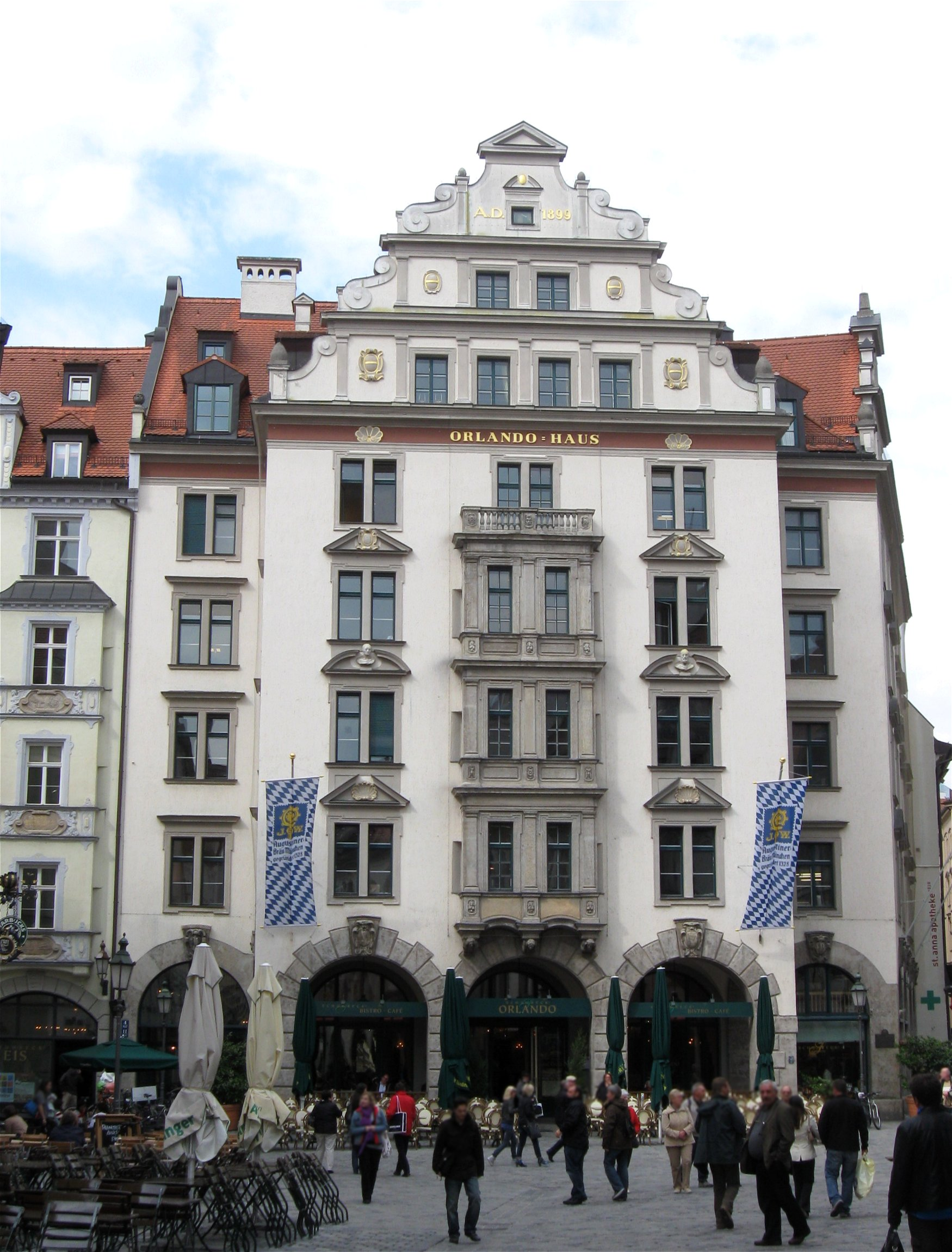 Platzl 4,4a; Orlando-Haus, Mietshaus mit Gastronomie, fünfgeschossiger Eckbau mit rustikagerahmten Erdgeschossarkaden, Flacherker besetztem Südrisalit, und Volutengiebeln, Gestaltung in Formen der deutschen Renaissance, erbaut von Jakob Heilmann und Max Littmann, 1898/99; mit Rückgebäude Falkenturmstraße 12.